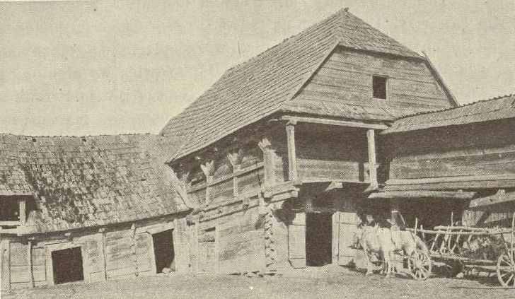 Garbarnia Ulanowskich w Kazimierz Dolnym